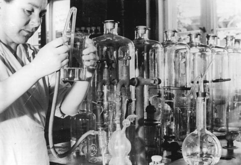 ADN-ZB Blunck Berlin Institut für Wasser- und Lufthygiene Hier wird die Trennung des Staubes vom Regenwasser vorgenommen. Die festen Bestandteile und der im Regenwasser gelöste Staub werden einer weiteren Untersuchung unterzogen. 1749-48 1948